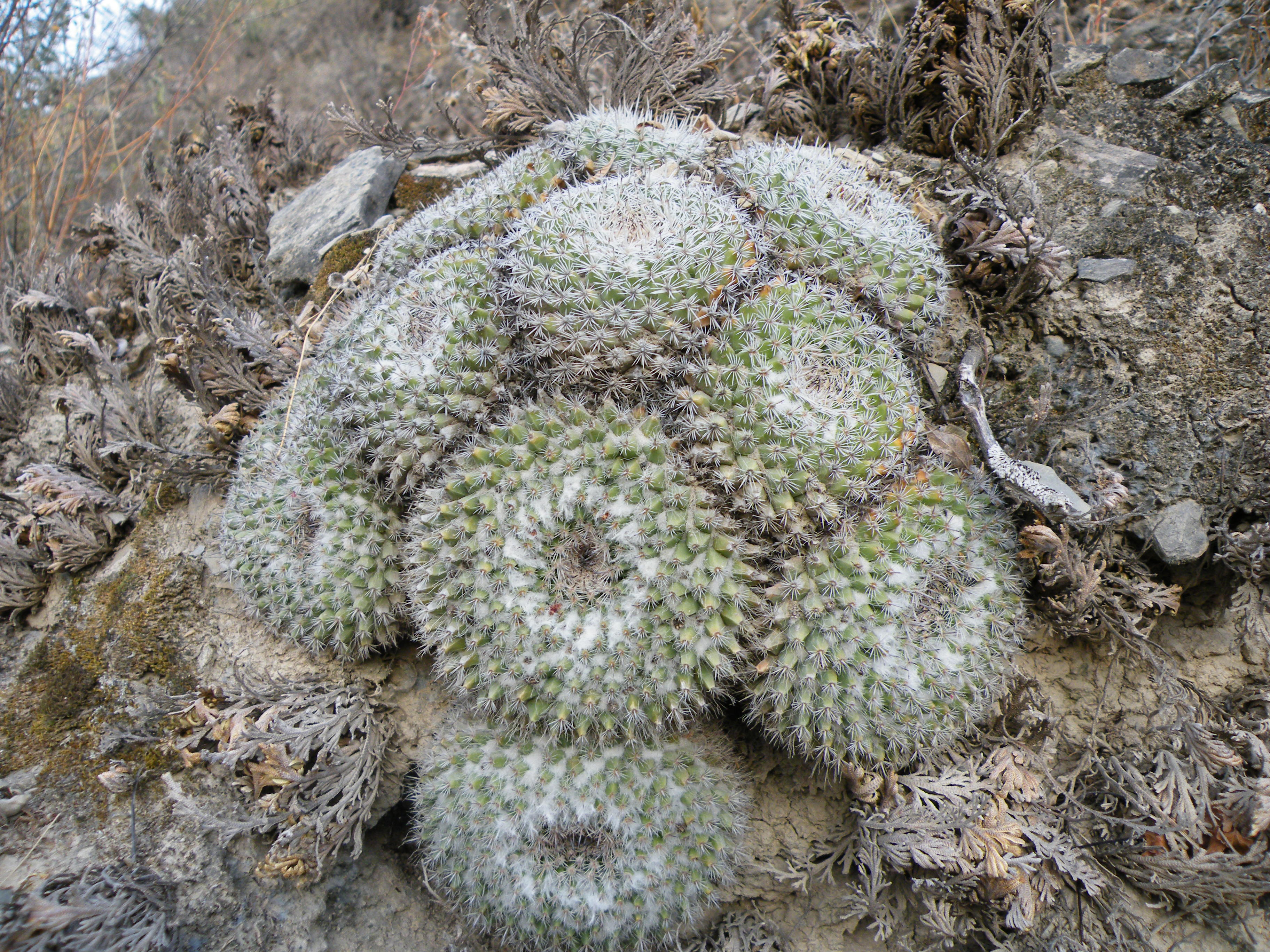 Xichu, Guanajuato